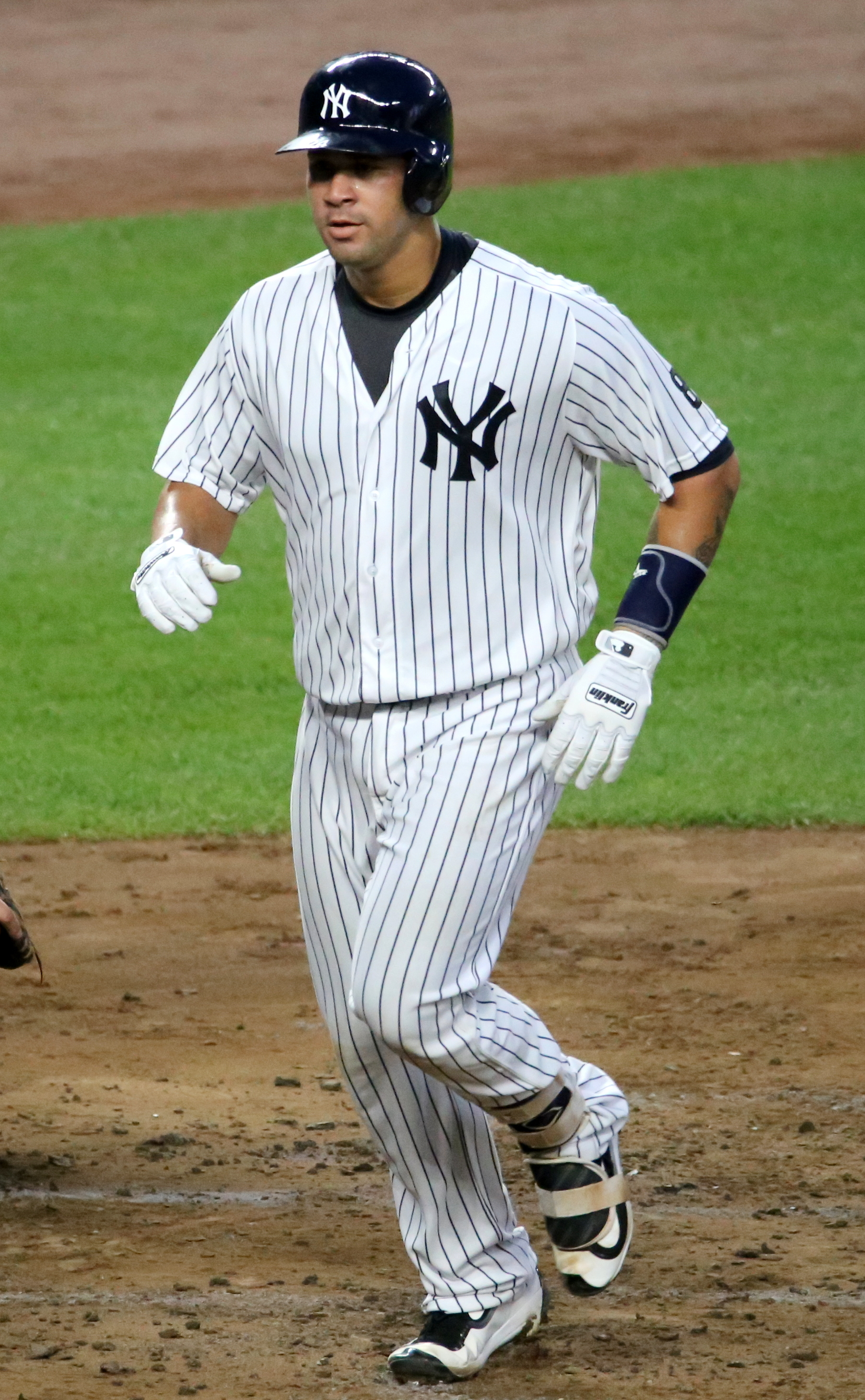 Gary Sánchez